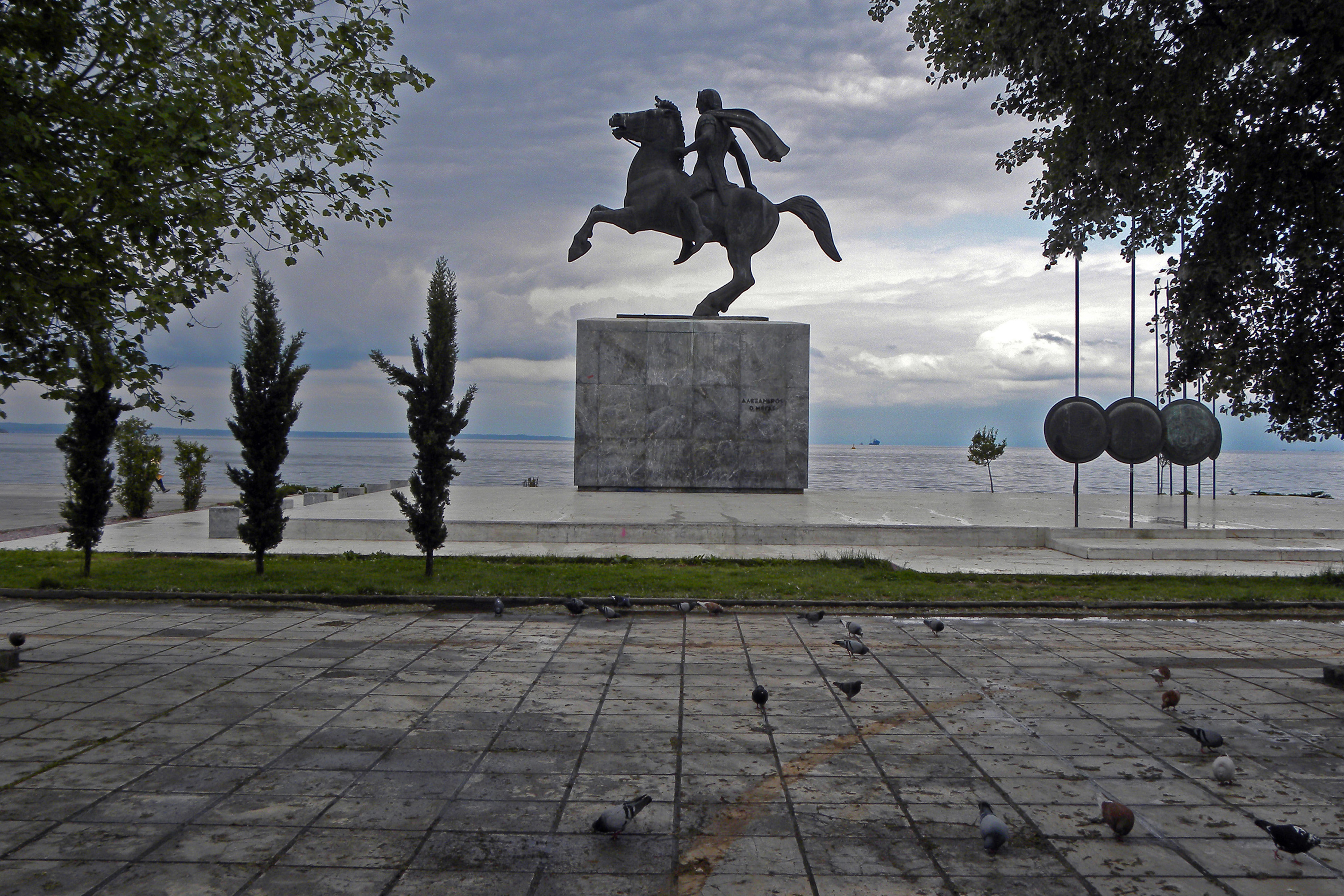 Ο Μέγας στη Παραλία